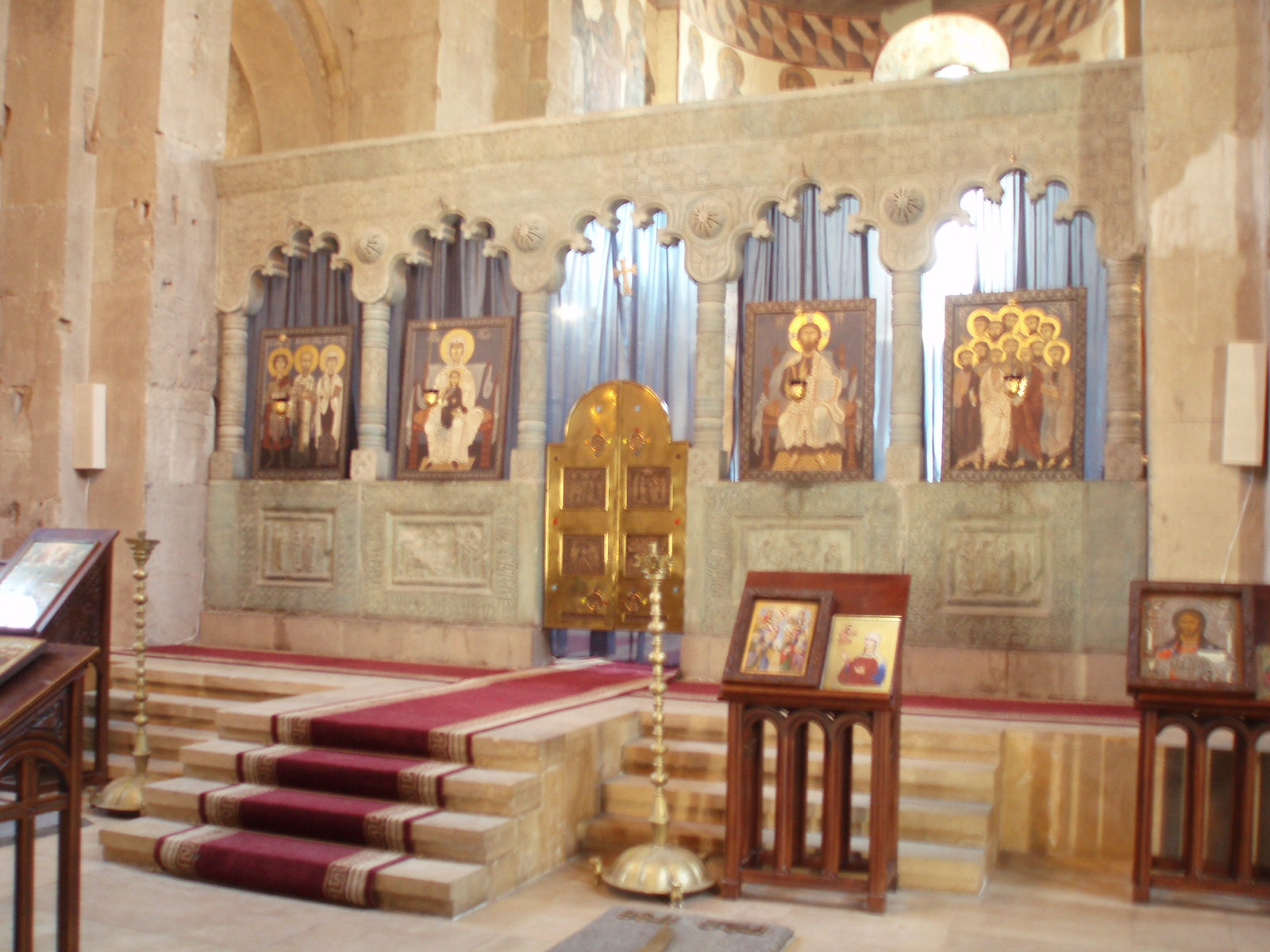 Sveti Tskhoveli iconostasis wall